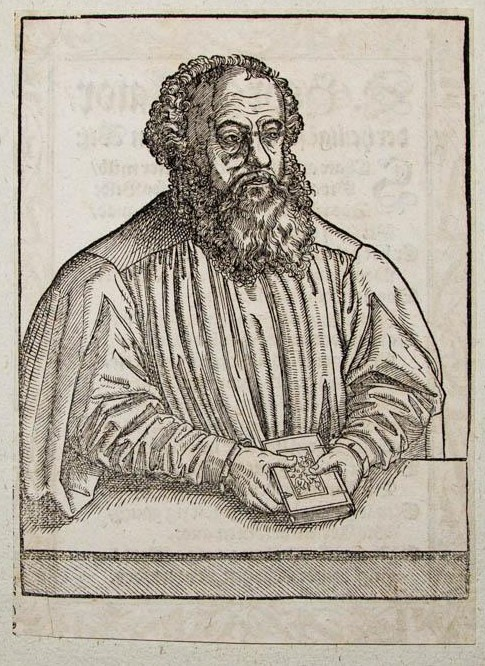 Johann Forster (Holzschnitt, ca. 15,7 x 11,5 cm (Blatt))